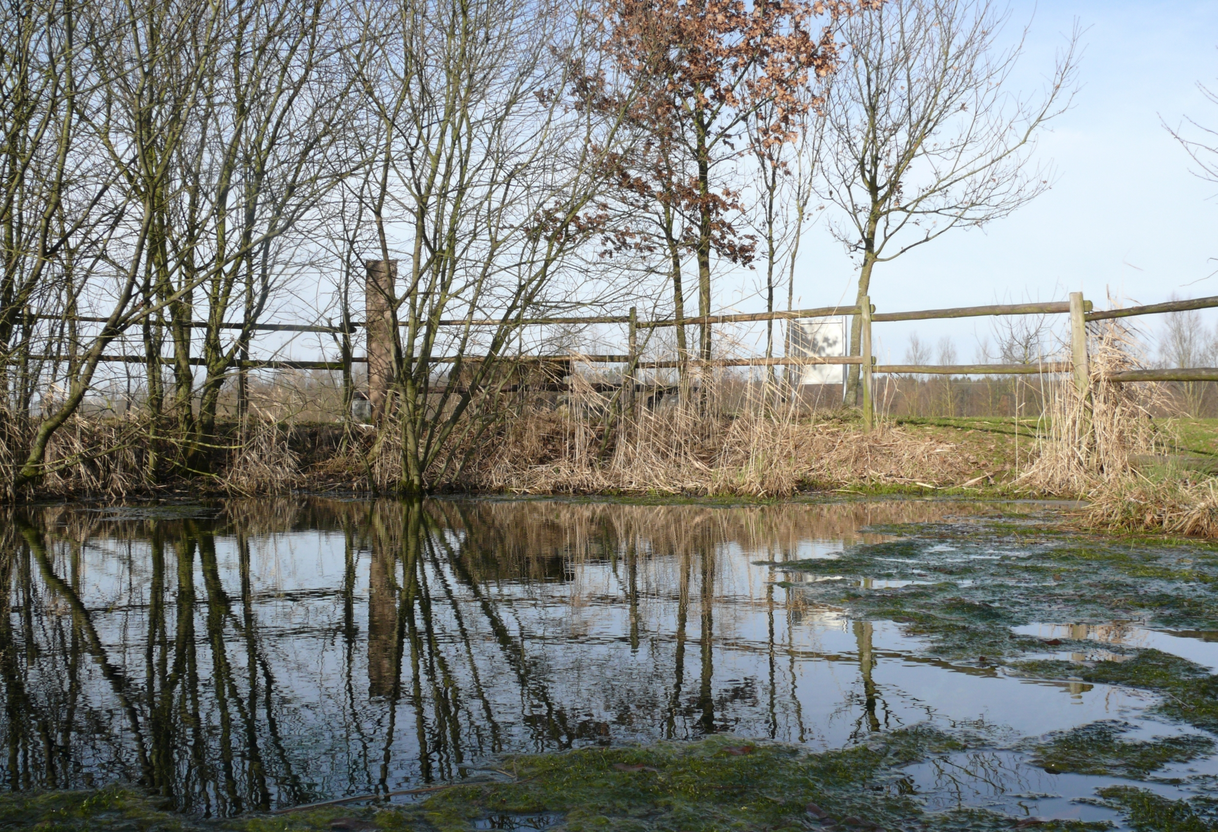 Gips-Karstquelle Gründischer Brunnen, Talaue der Speltach (Nebenfluss der Jagst) zwischen Ober- und Unterspeltach, SW Crailsheim, Nordwürttemberg.